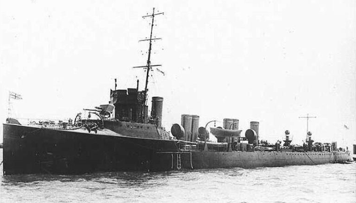 Der bitische Zerstörer HMS Viking 1910 der Tribal-Klasse